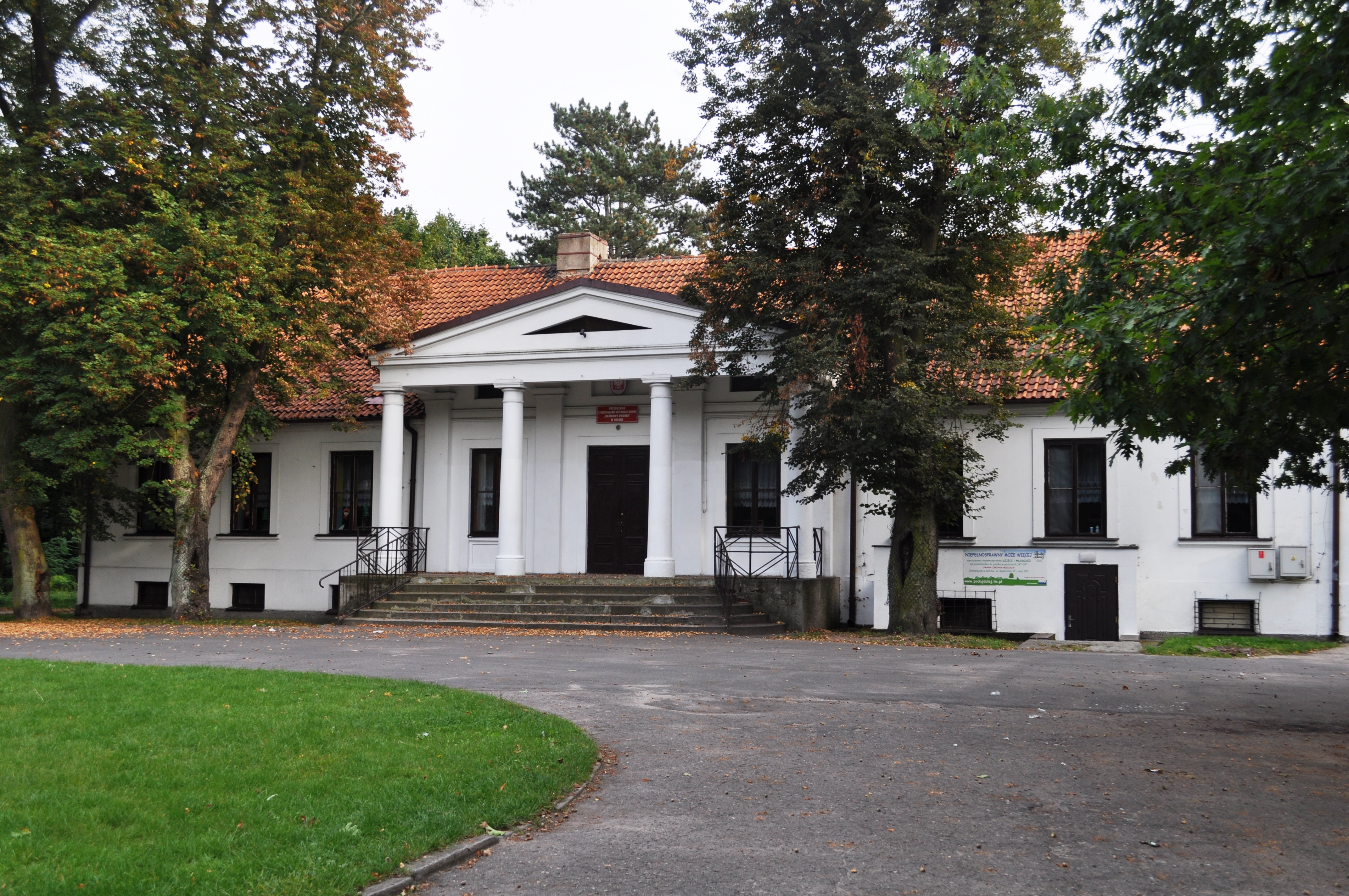 Golina, zespół dworski, 1 poł. XIX Zespół dworsko – folwarczny w skład którego wchodzi dwór z XIX wieku rozbudowany na początku XX wieku. Otoczony jest parkiem krajobrazowym z początku XIX wieku o powierzchni 7 ha, z bogatym drzewostanem. W parku znajduje się także wysepka otoczona wodą, a ze skarpy roztacza się rozległy widok na dolinę Warty.